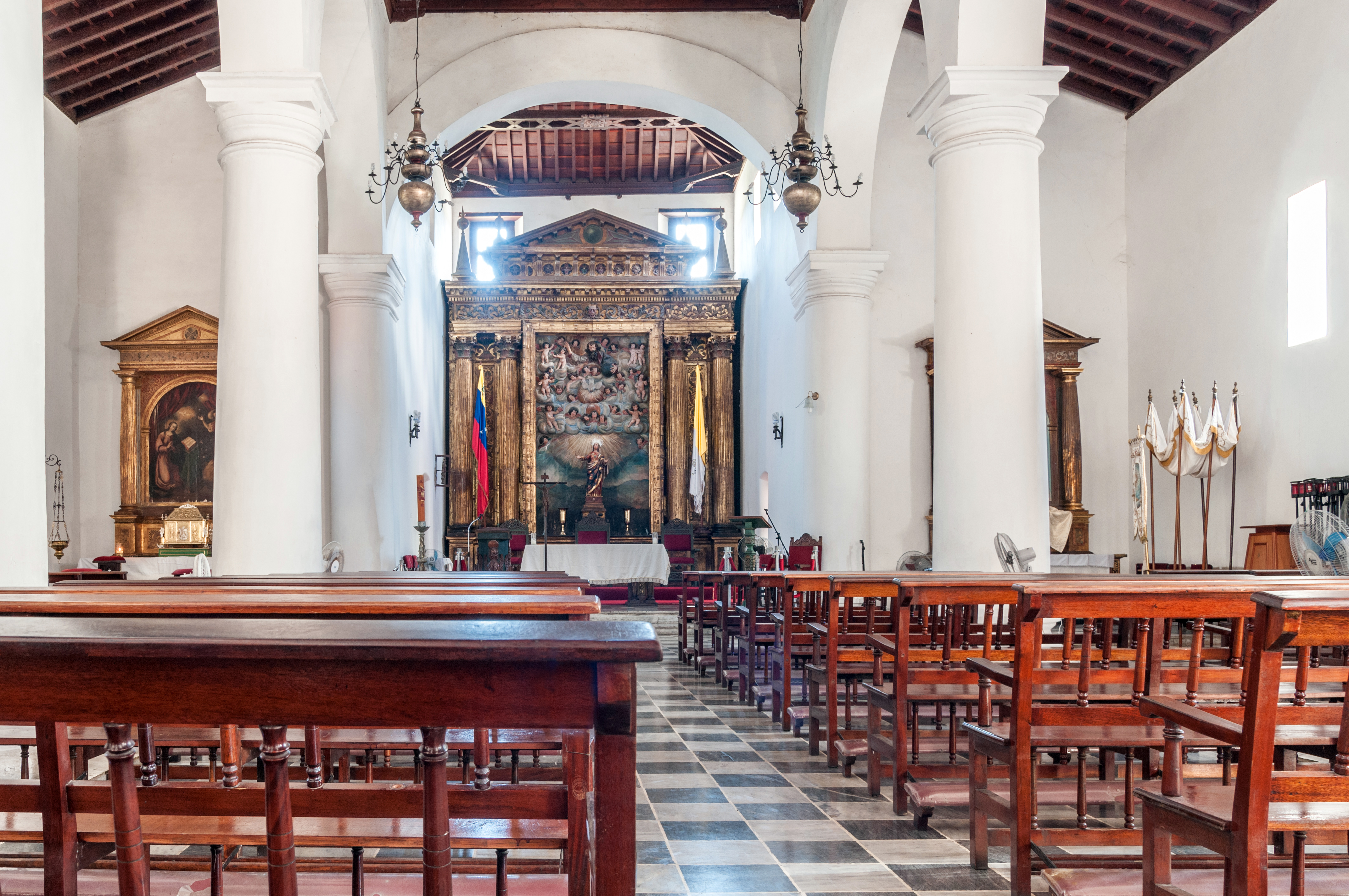 Cúpula principal interior de la Catedral de La Asunción, en la Isla de Margarita.